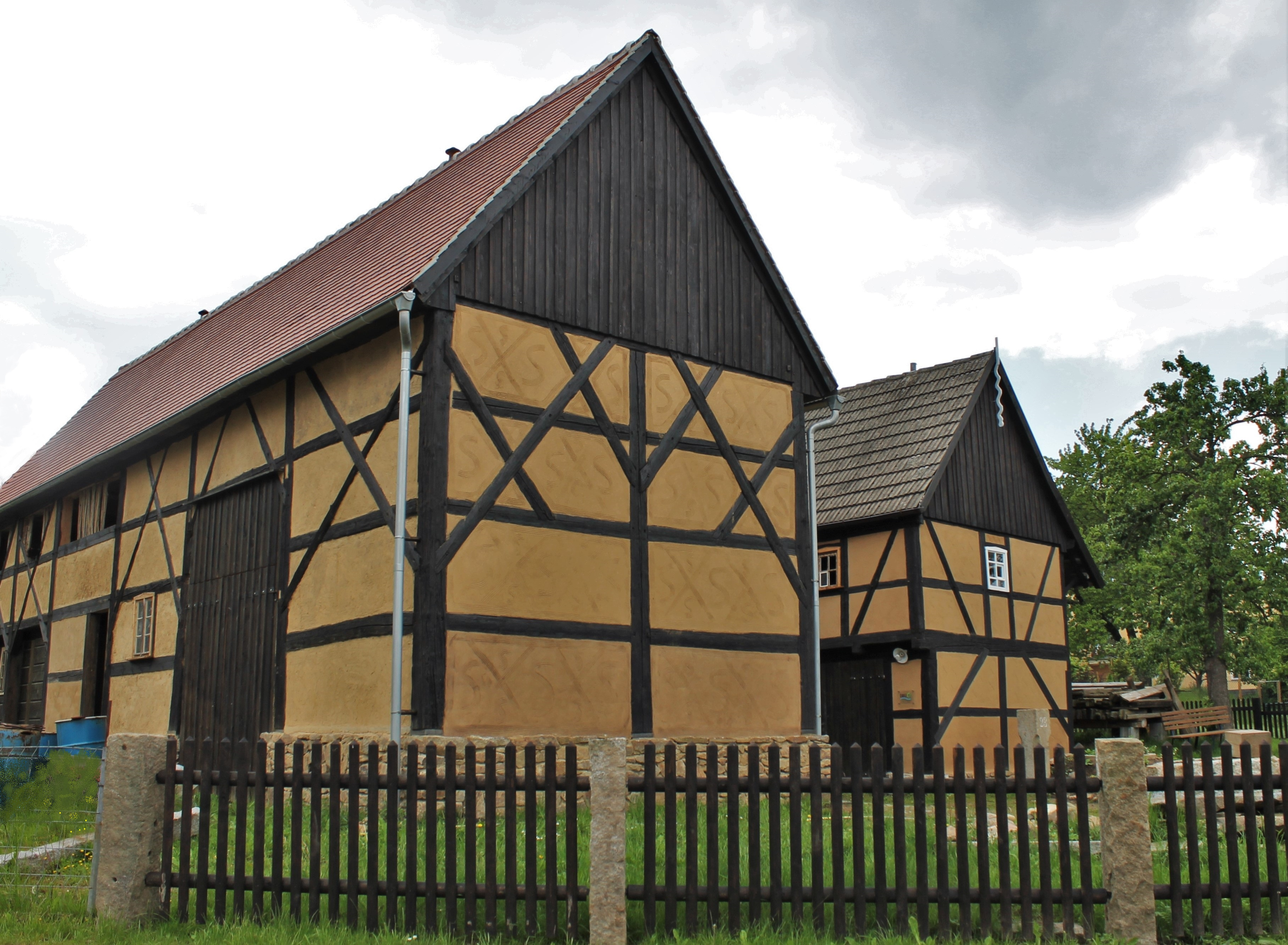 Dorfstraße 23, Großhänchen (Burkau), Umgebindehaus mit Fachwerkscheune, um 1726 gebaut